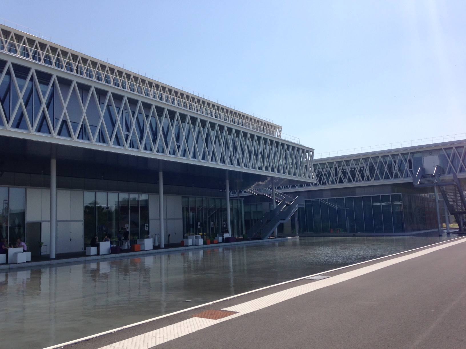 Archives nationales : vue partielle du bâtiment de Pierrefitte-sur-Seine